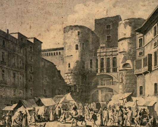 Plaza Nueva de Barcelona, 1614.